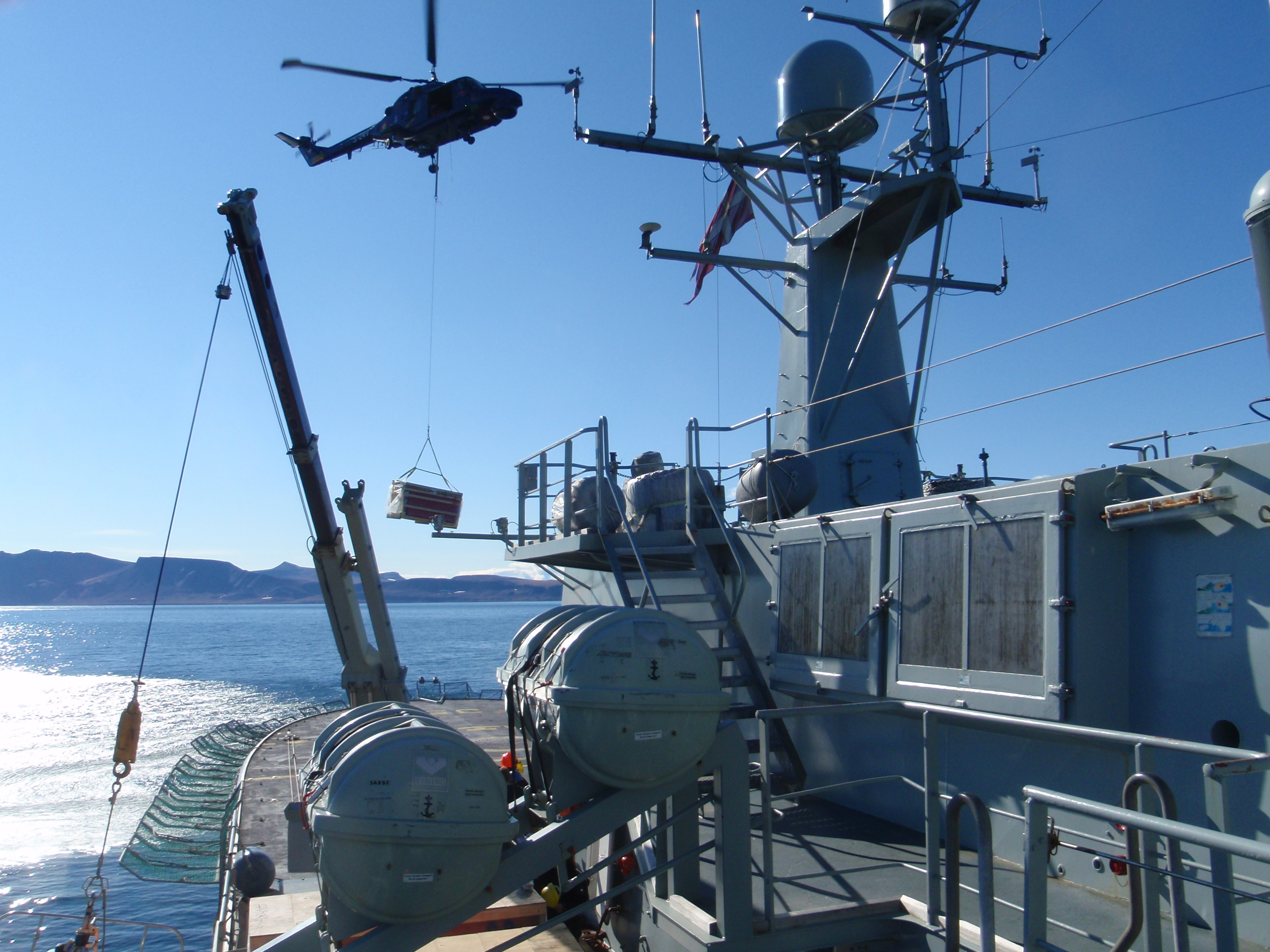 Westland Lynx med sling over Inspektionsskibet VÆDDEREN 2008